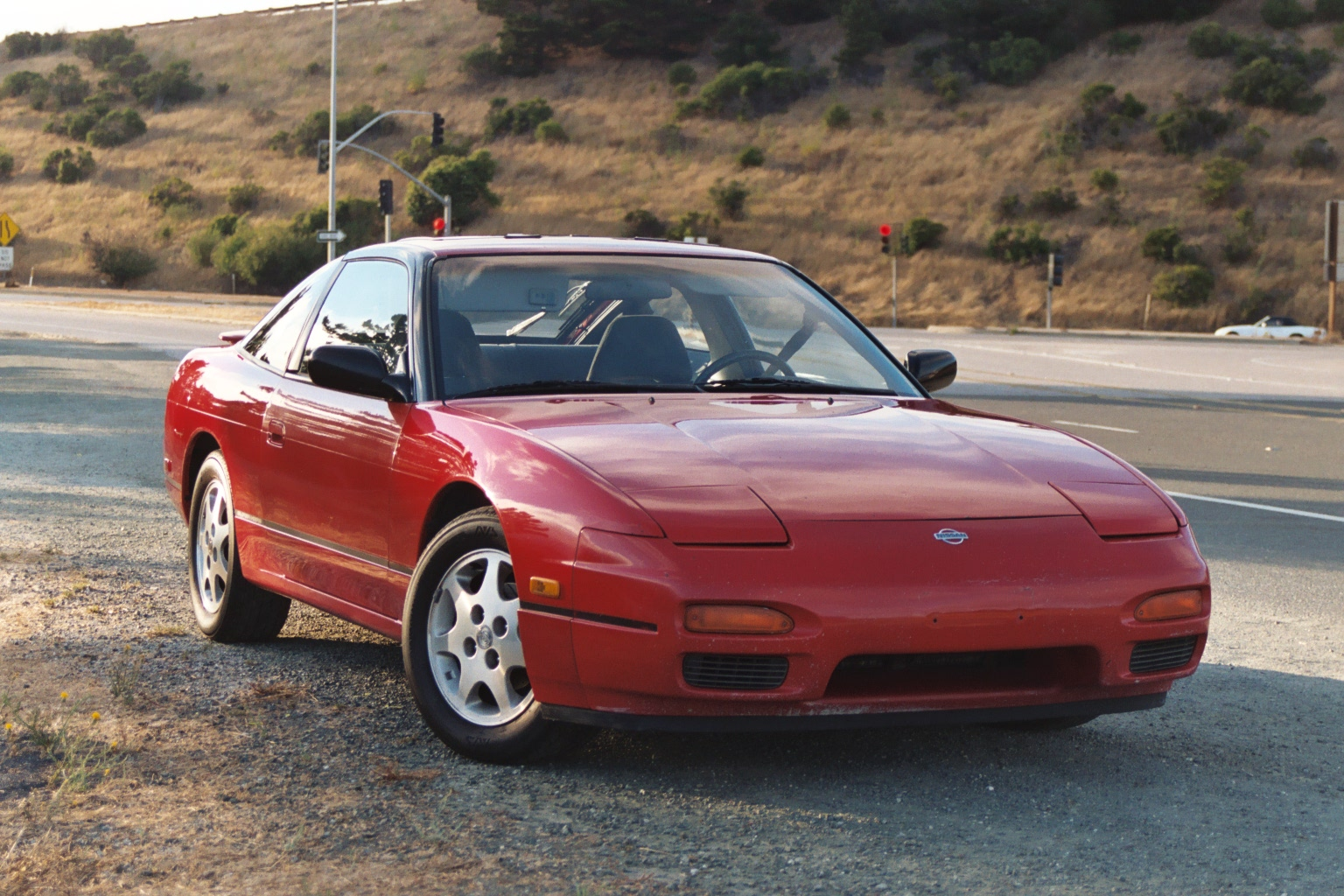 Nissan 240SX rear view004_1A